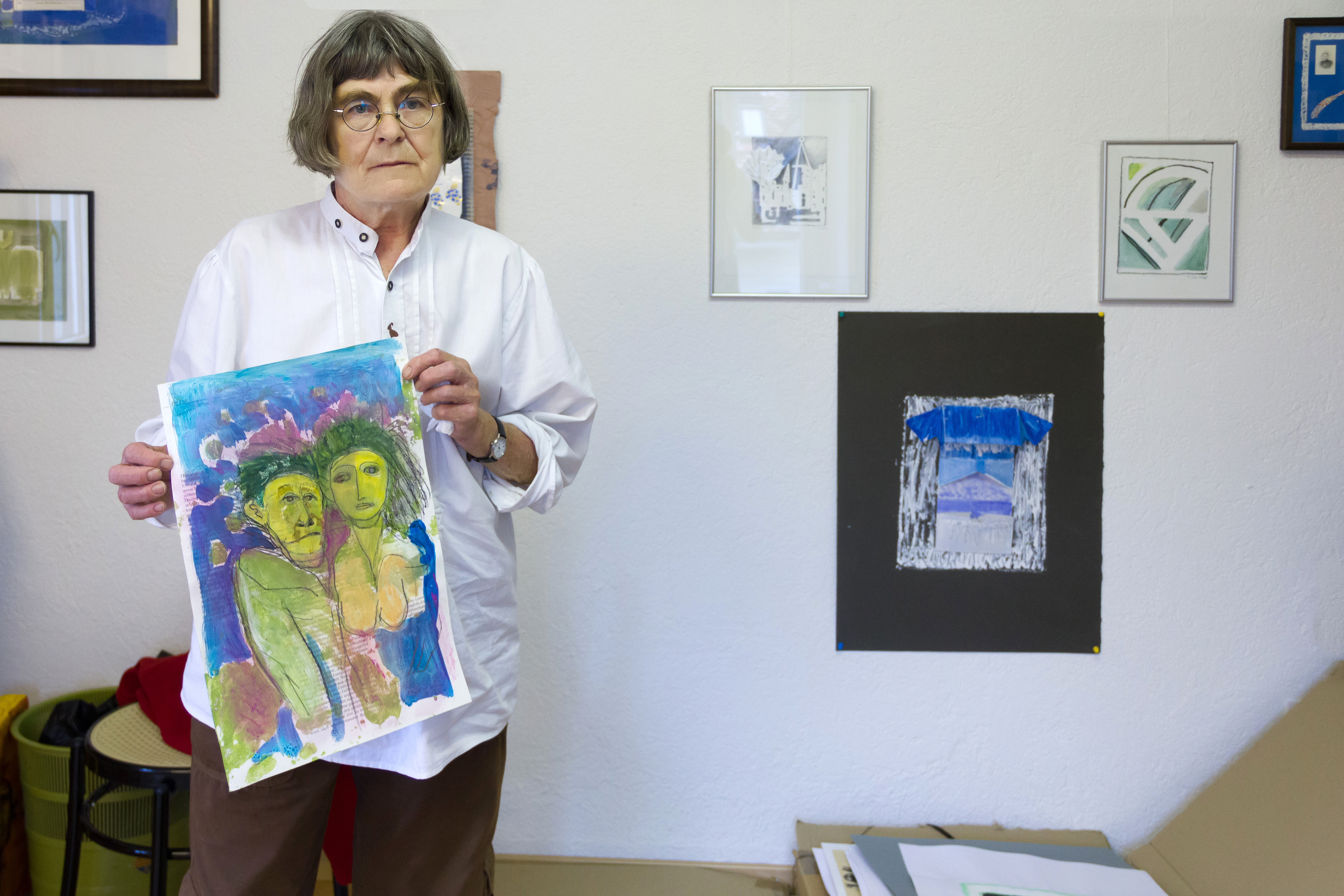 Die Künstlerin Susanne Schenda in ihrem Atelier in der Schweiz, Jona (August 2010).